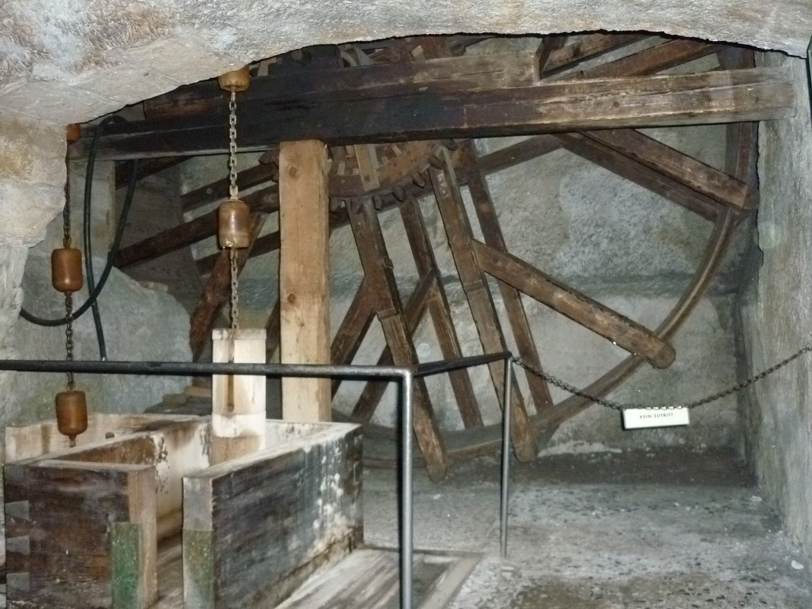 Heinzenkunst. Nachbau im Deutschen Museum München, Abteilung Bergbau